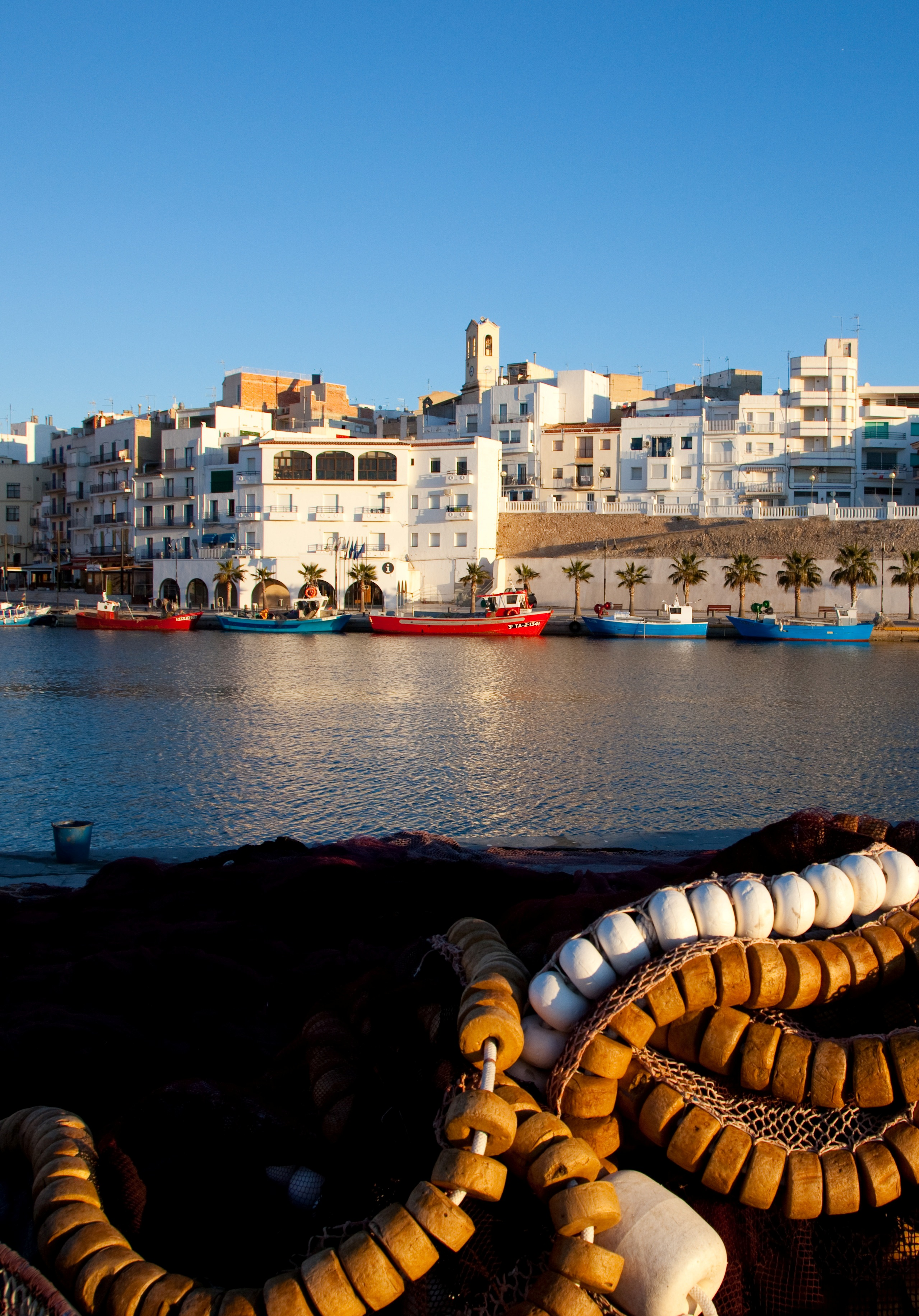 Foto del puerto de l'Ametlla de Mar con redes en primer plano.